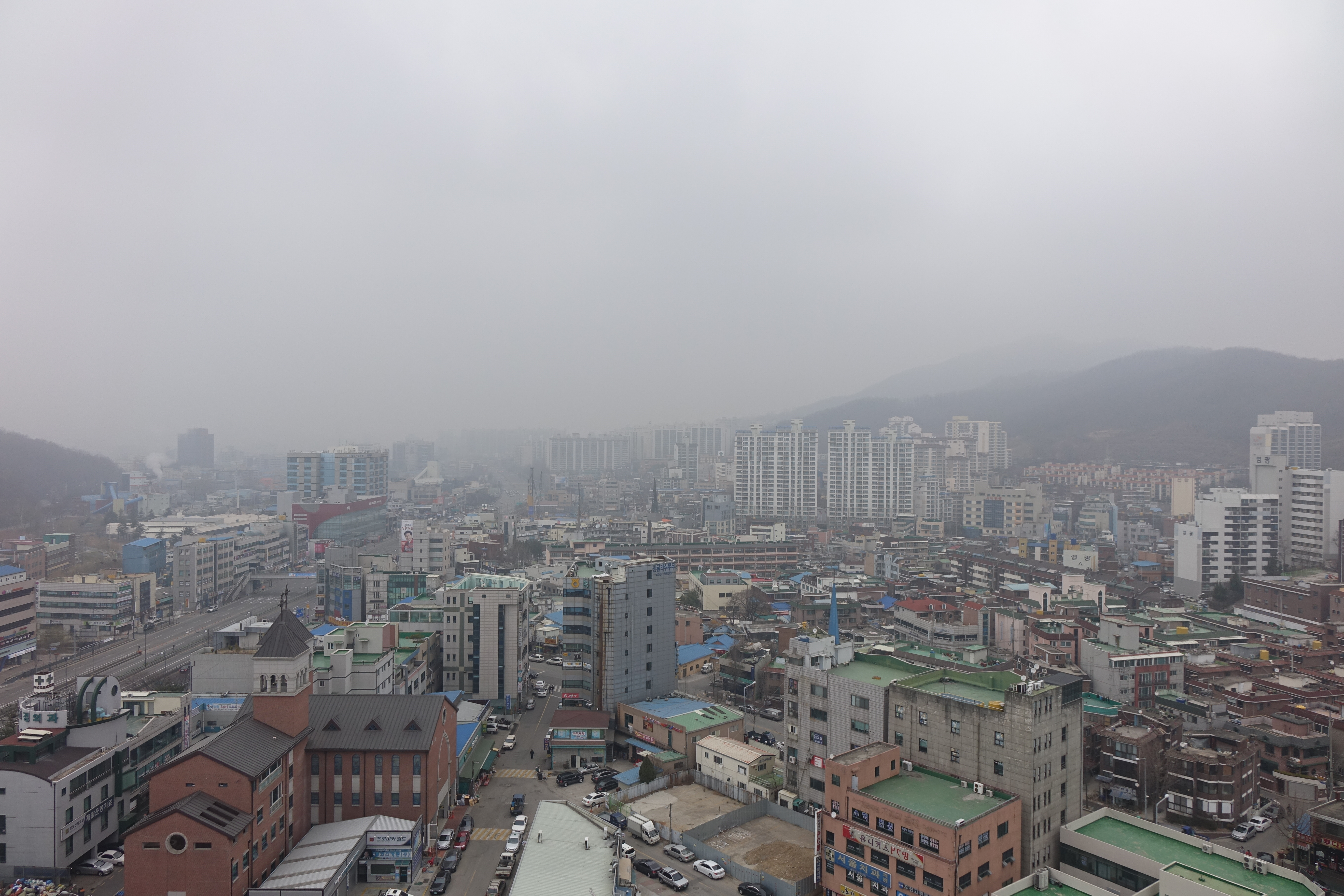 본 사진을 퍼블릭 도메인으로 배포합니다. 2015년 3월 31일. 최광모.